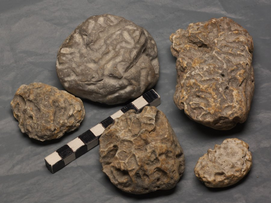 Furchensteine vom Chiemsee, diverse aus meiner Sammlung, Kalksteingeröll mit biogener Furchenbildung